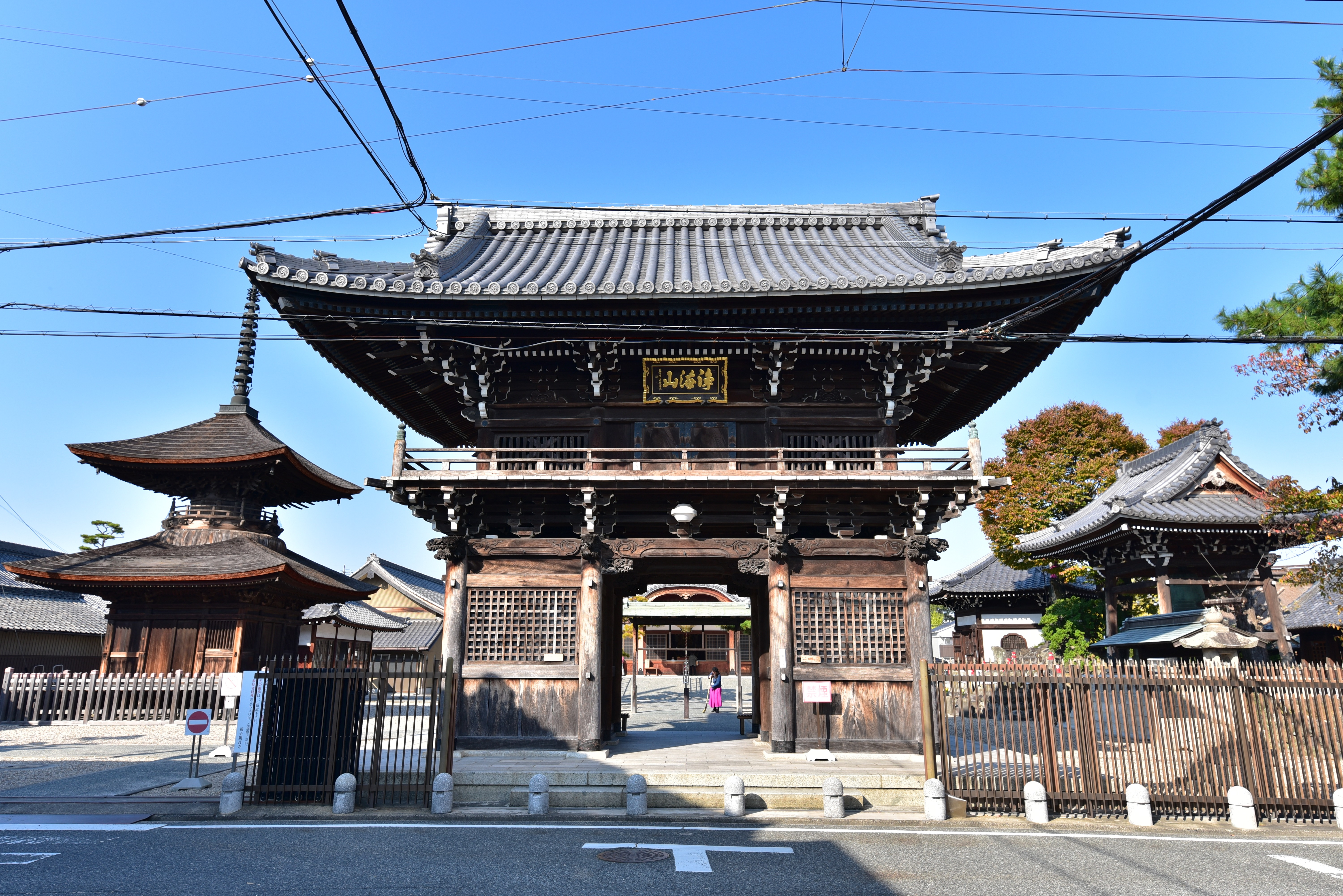 荒子観音の山門